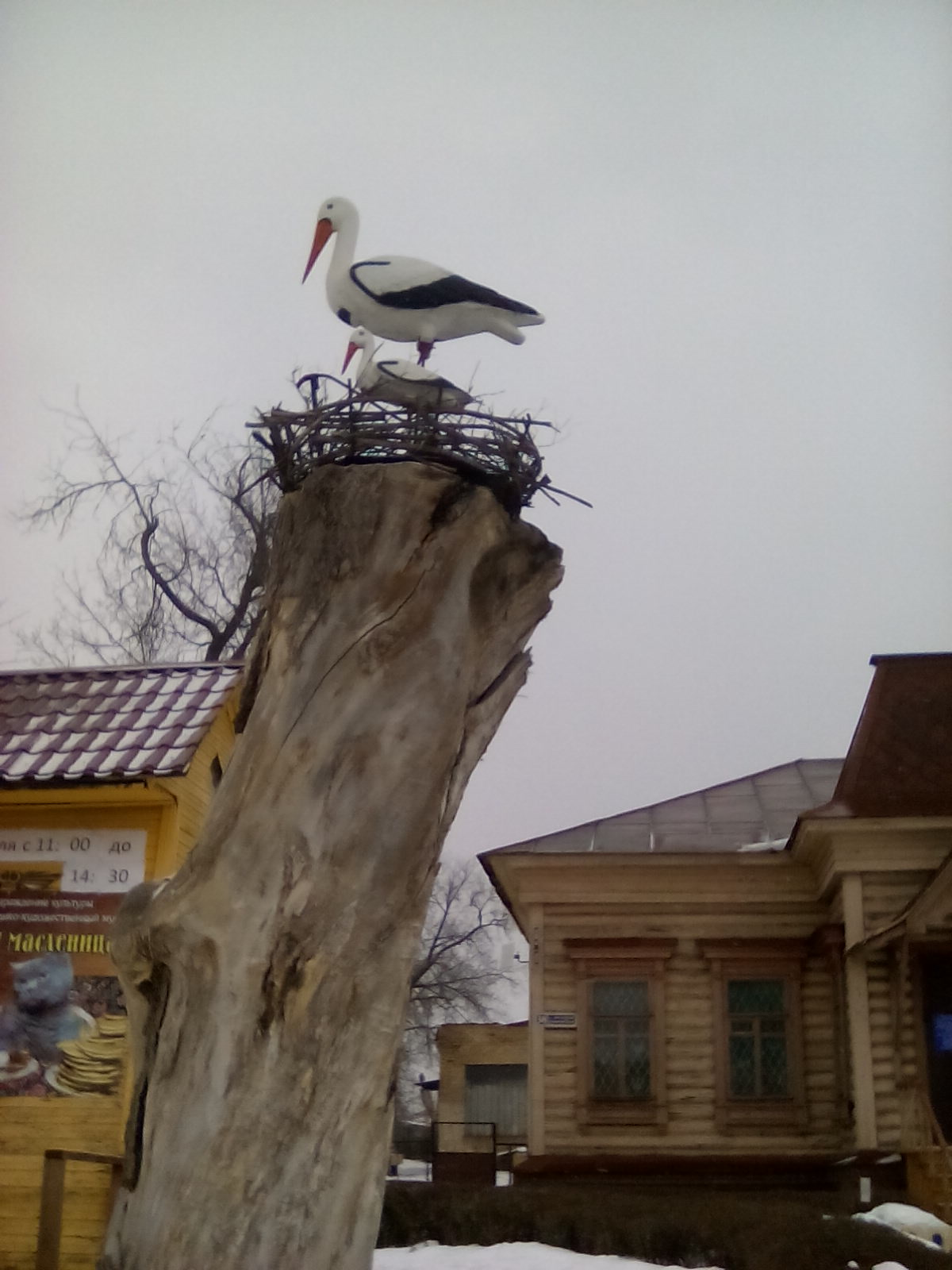 Любимое место горожан и туристов